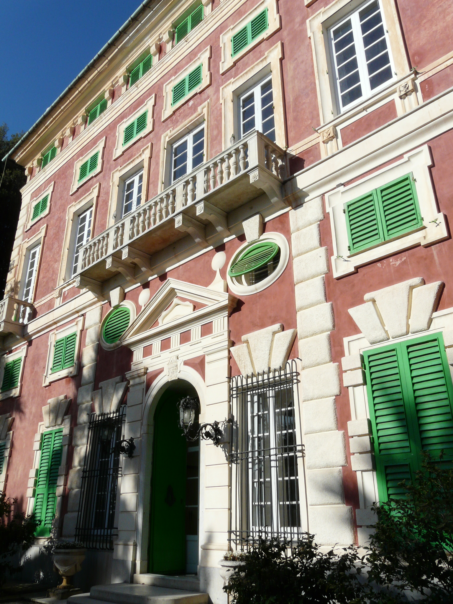 Villa Durazzo Centurione, Santa Margherita Ligure, Liguria, Italia